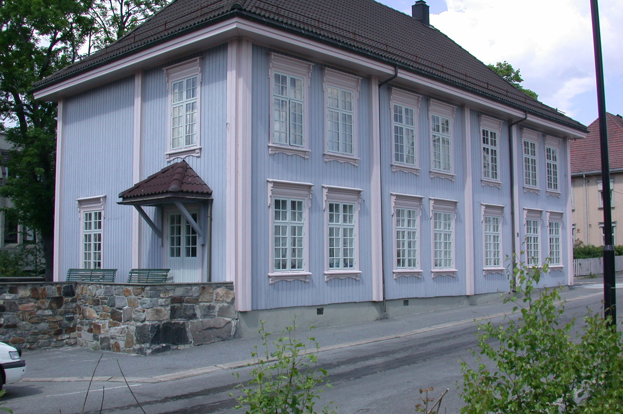 Irgensgården i Myntgata 10, Kongsberg, der IKA Kongsberg holdt til frem til 2014.